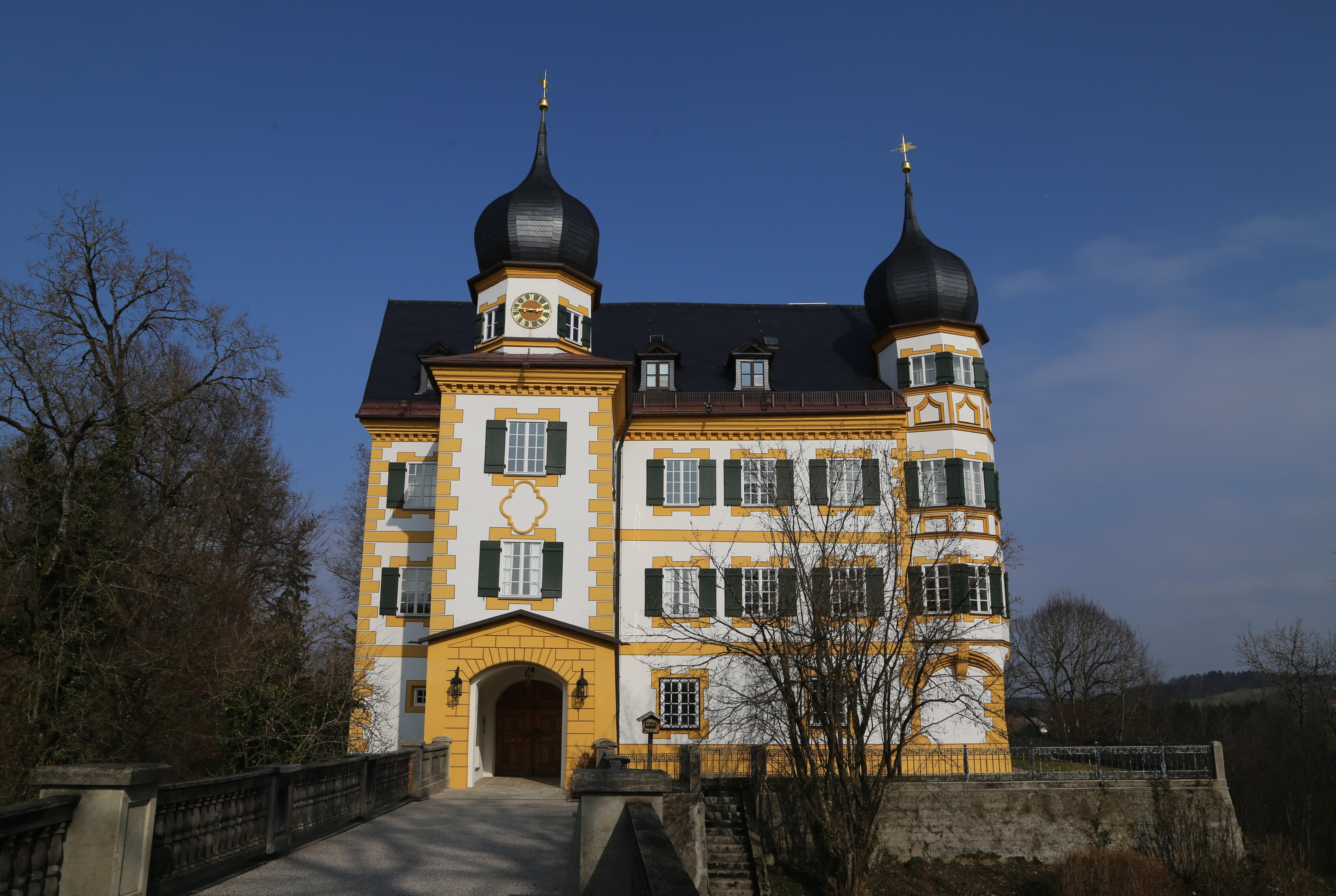 Ludwigstraße 10; Schloss Wildenwart, dreigeschossige Vierflügelanlage um einen Arkadenhof, südwestlicher Torbau mit Satteldach und Torturm sowie südlichem Erkerturm jeweils mit Zwiebelhaube, seit 1200 angelegt, mittelalterlicher Kern nur noch teilweise in Umfassungsmauern erhalten, heutige Baugestalt um 1600, 1689-90 Umgestaltung; mit Ausstattung; Gartenanlage, im Graben der ehem. Burg.